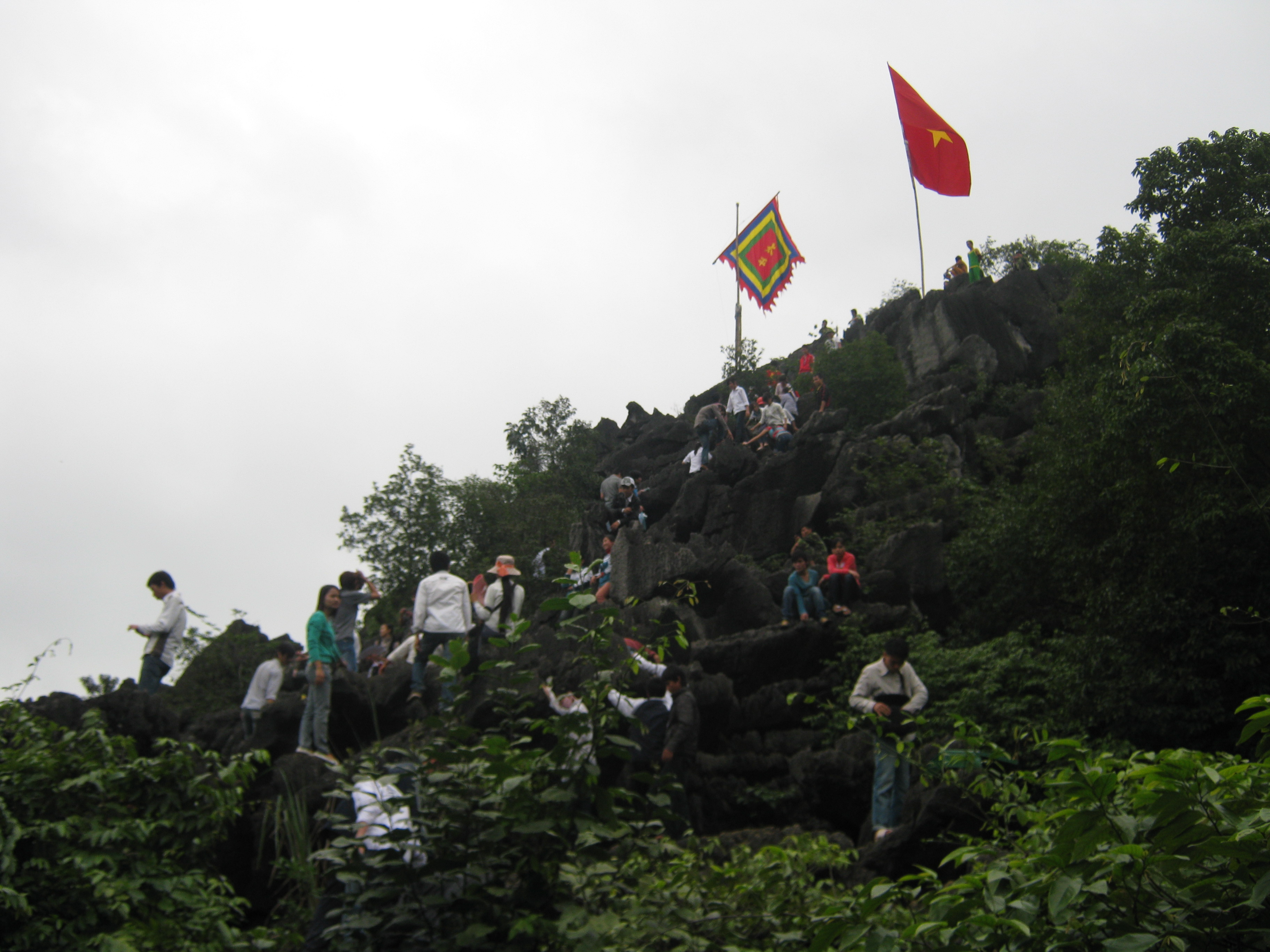 cố đô Hoa Lư và lễ hội cố đô Hoa Lư 2010